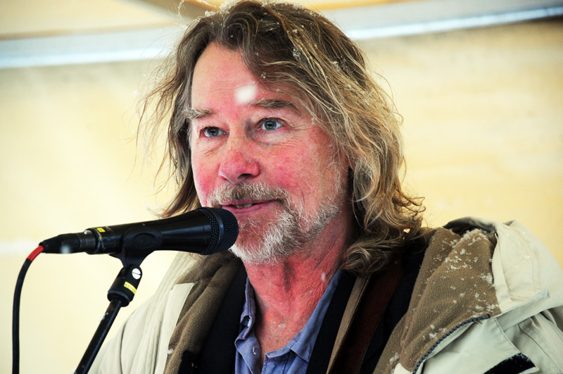 Peter Lundblad uppträder under Stockholms Stadsmissions Jullunch för Hemlösa 21 december 2012.